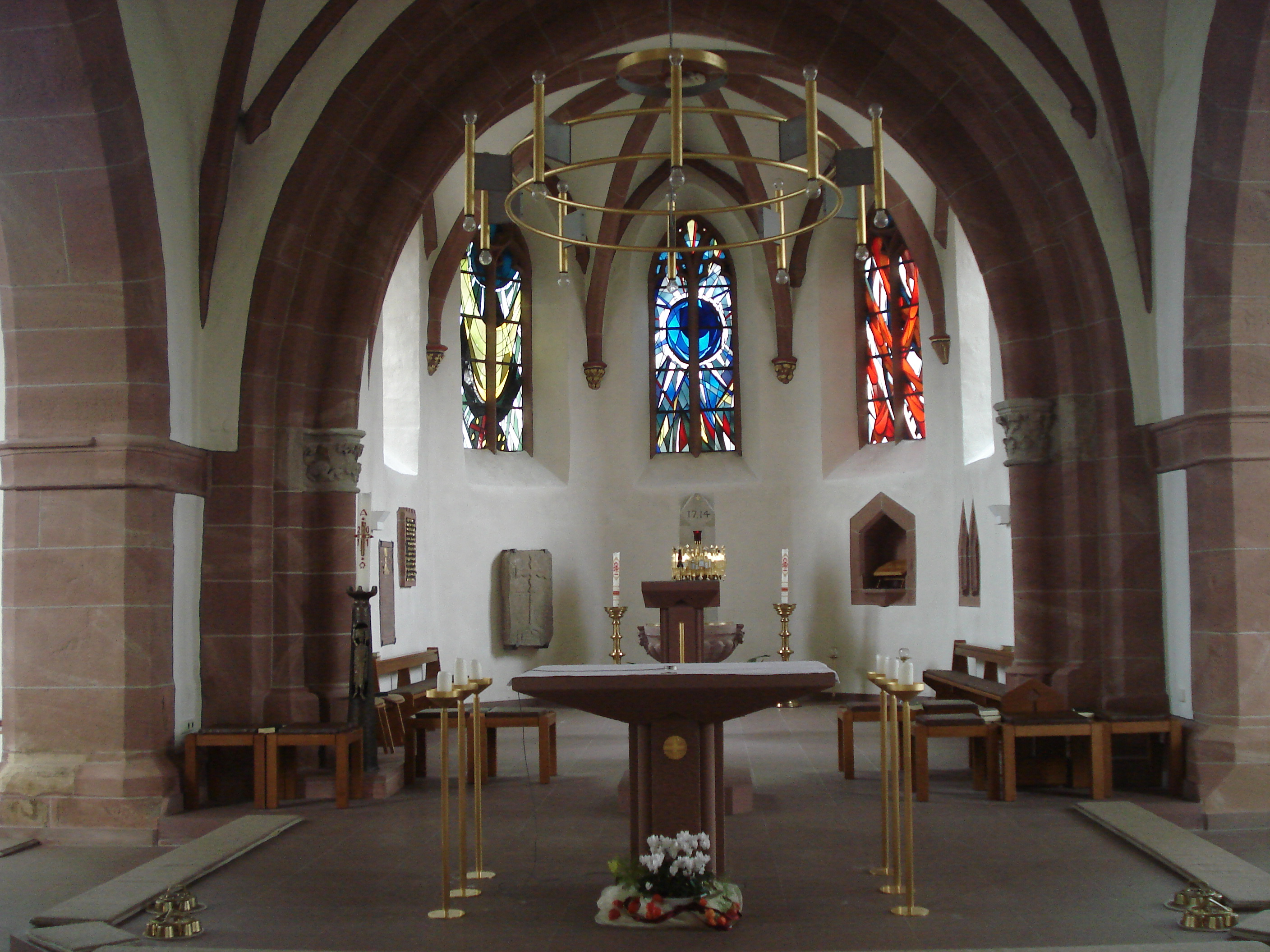 Der Altar in der St. Katharinakirche in Ernstkirchen